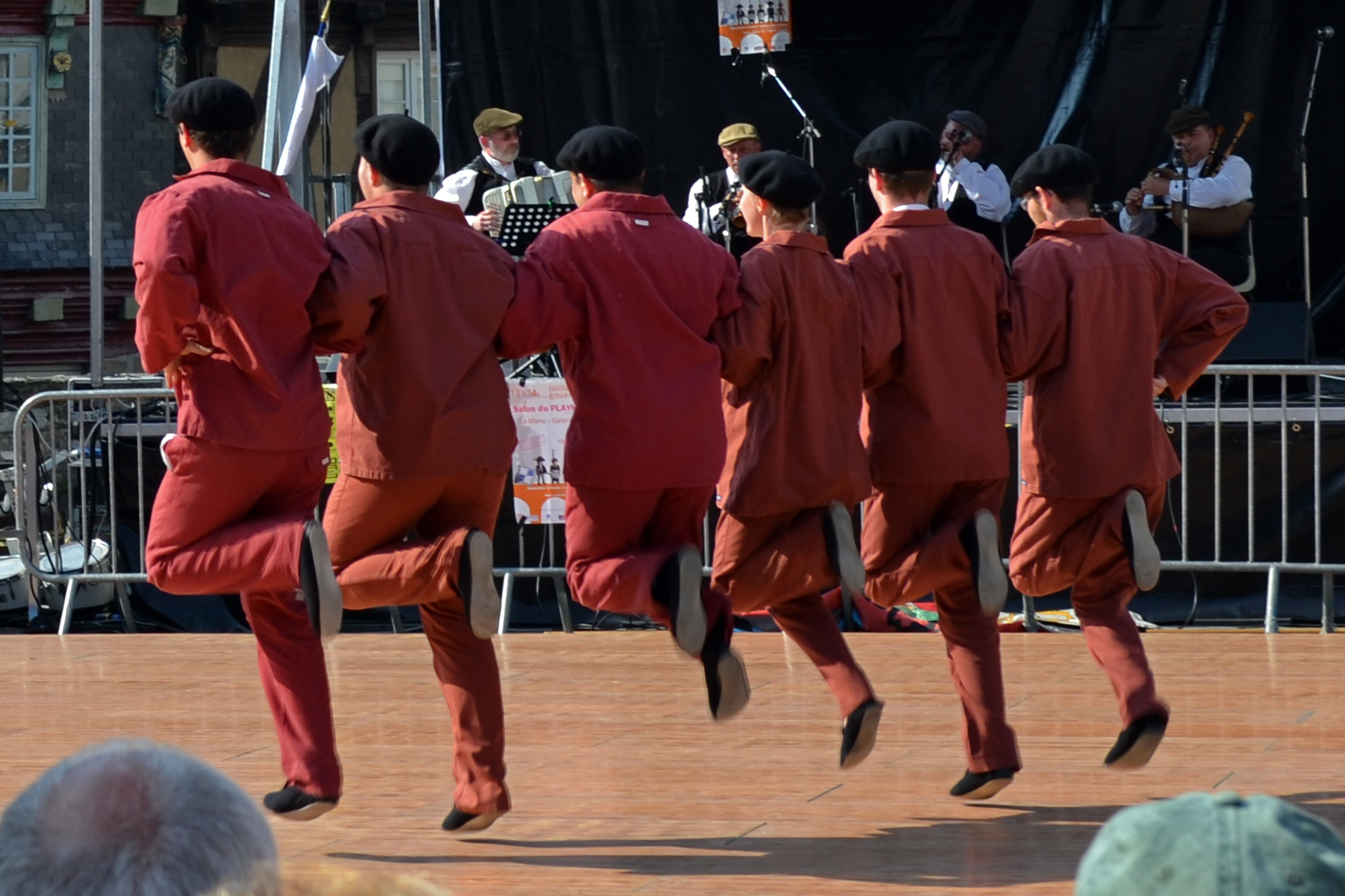 Korollerien Montroulez lors d'une Journée Bretonne à Morlaix le 7 juillet 2013.